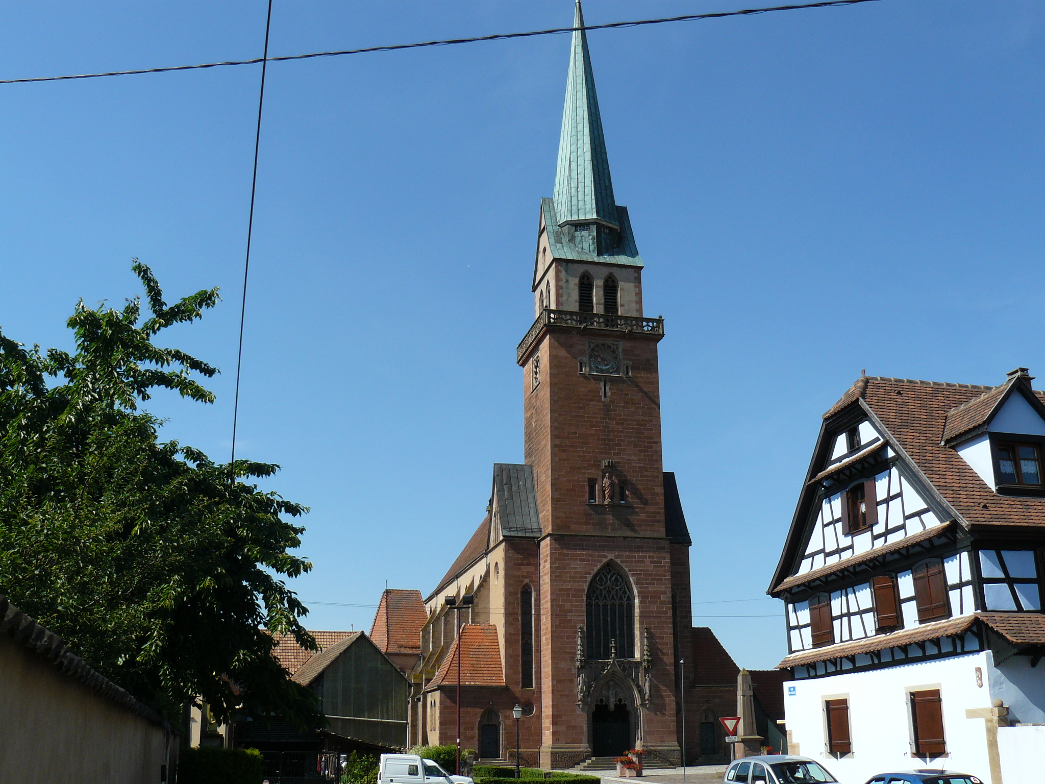 Église Saint-André